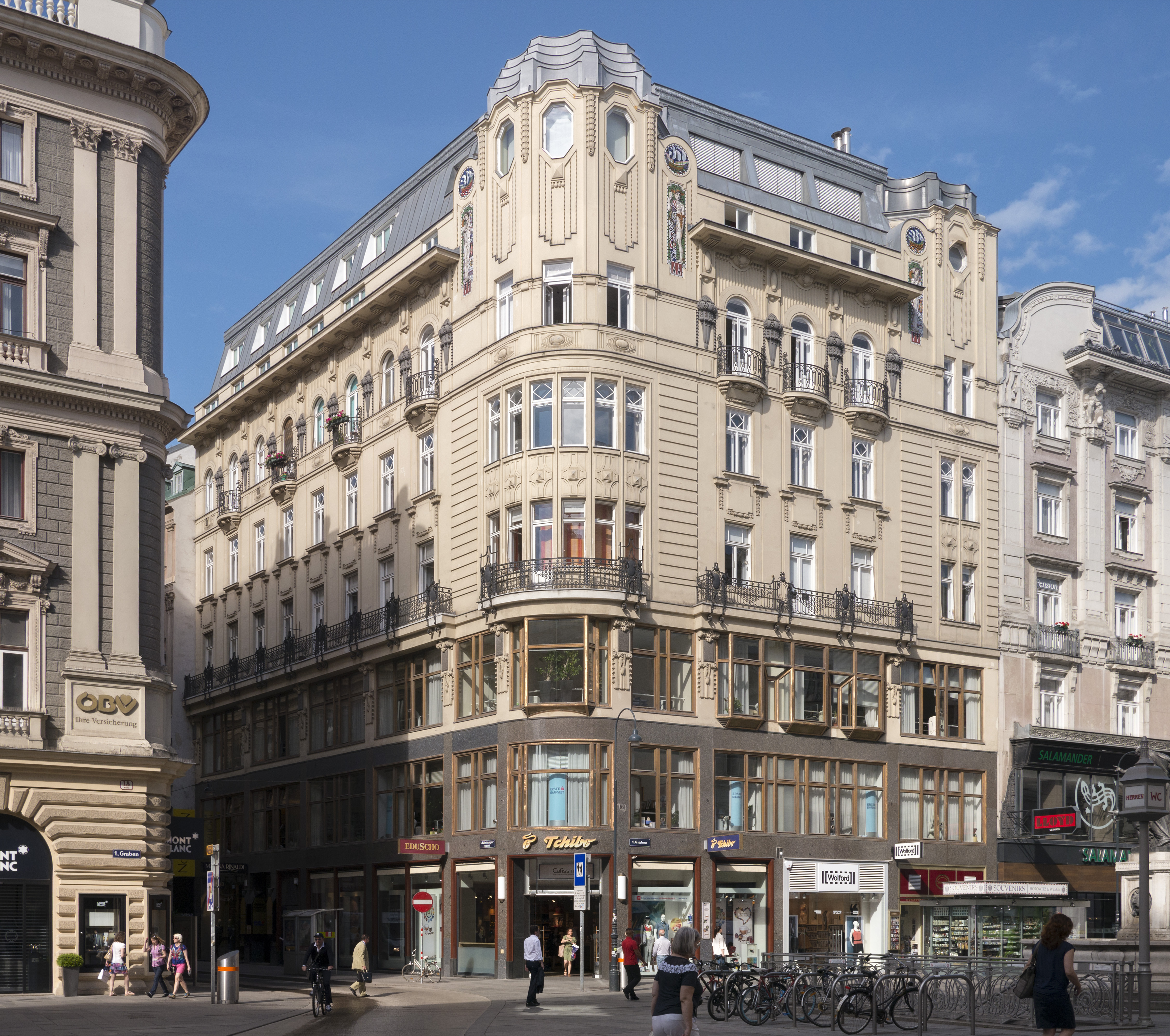 Wohn- und Geschäftshaus mit Geschäftsausstattung Fa. Gramola